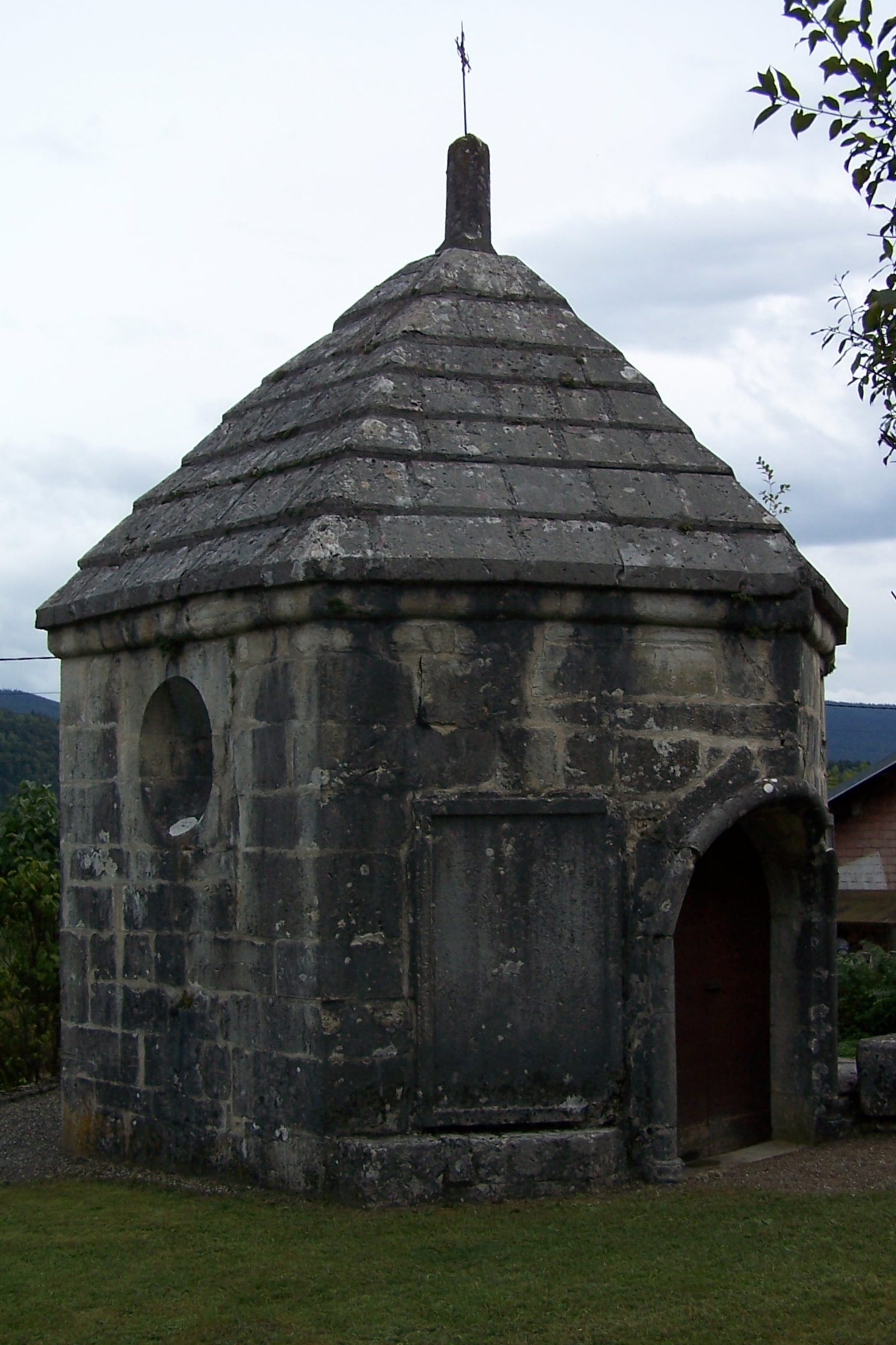 Chapelle Sainte-Claire in Maillat, Frankreich